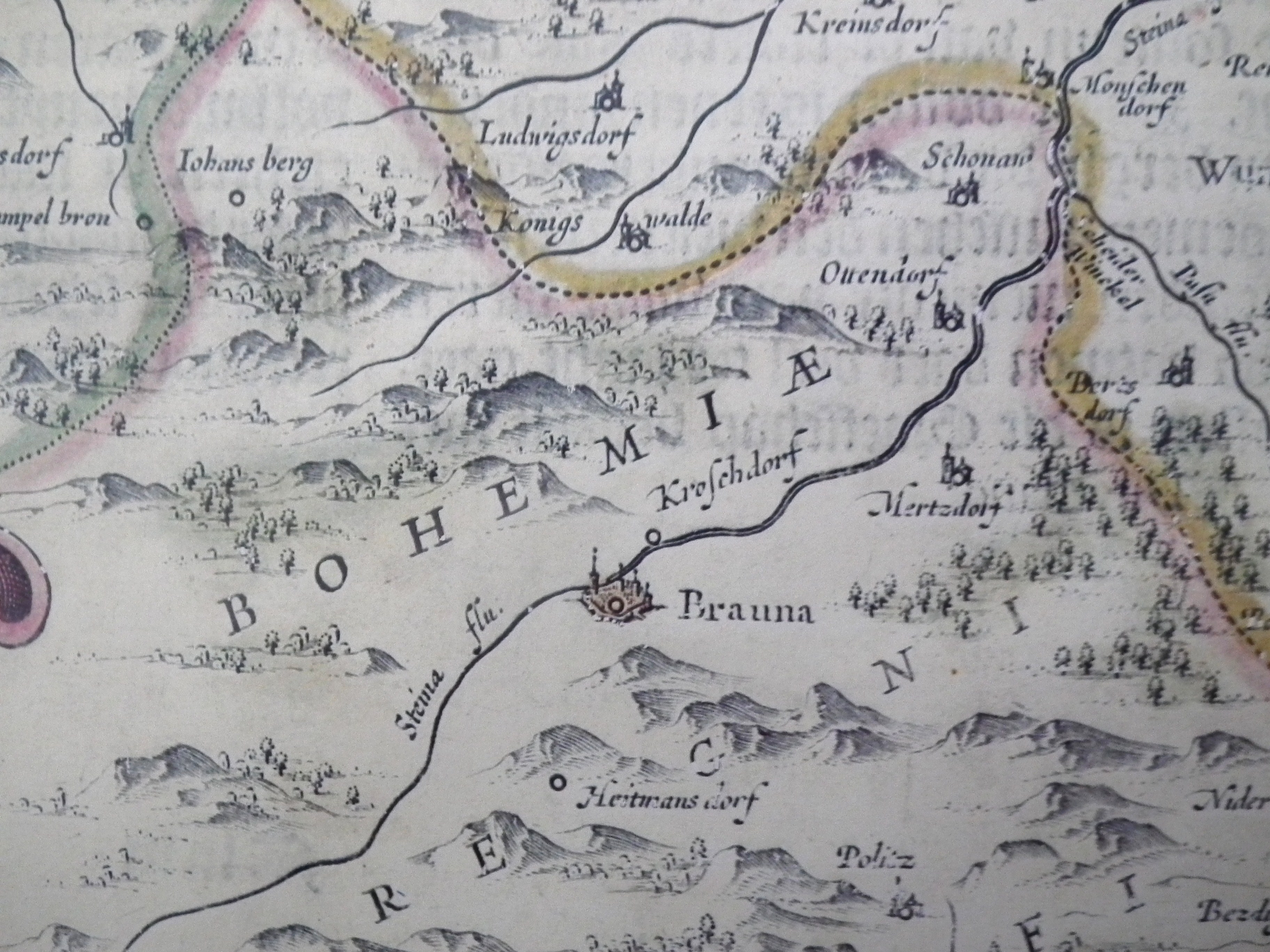 Mapa Scultetusa z 1630.